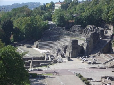 Photo de l'Odéon de Lyon situé sur la colline de Fourvière